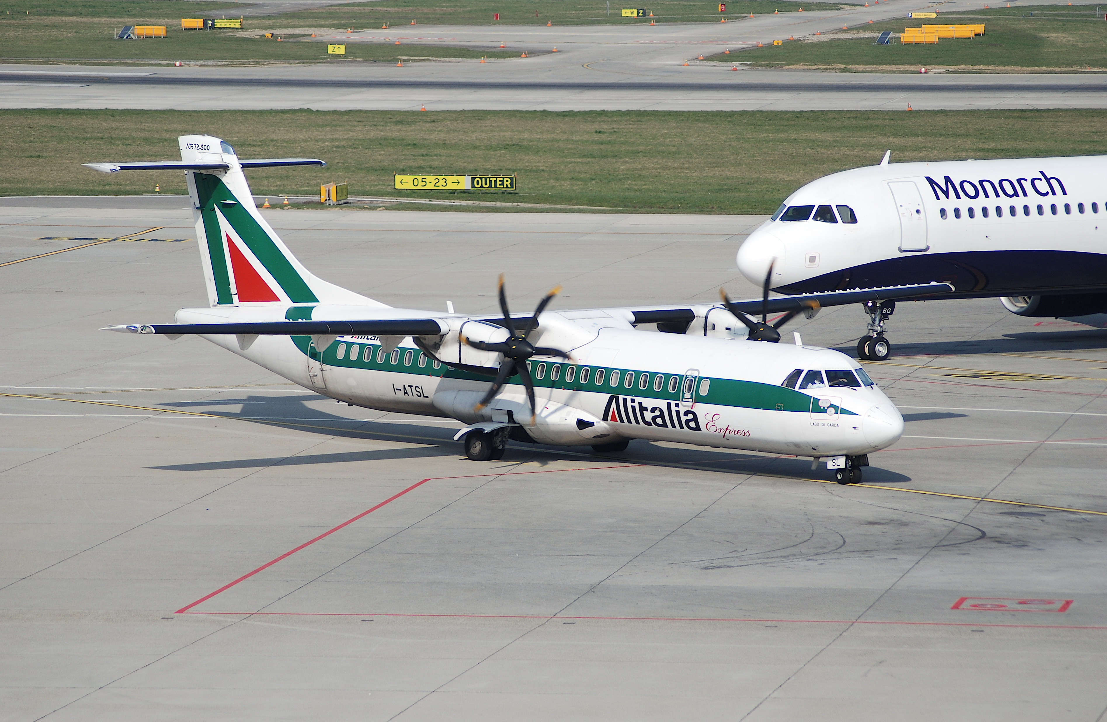 Alitalia ATR 72; I-ATSL@GVA;25.03.2007/456az